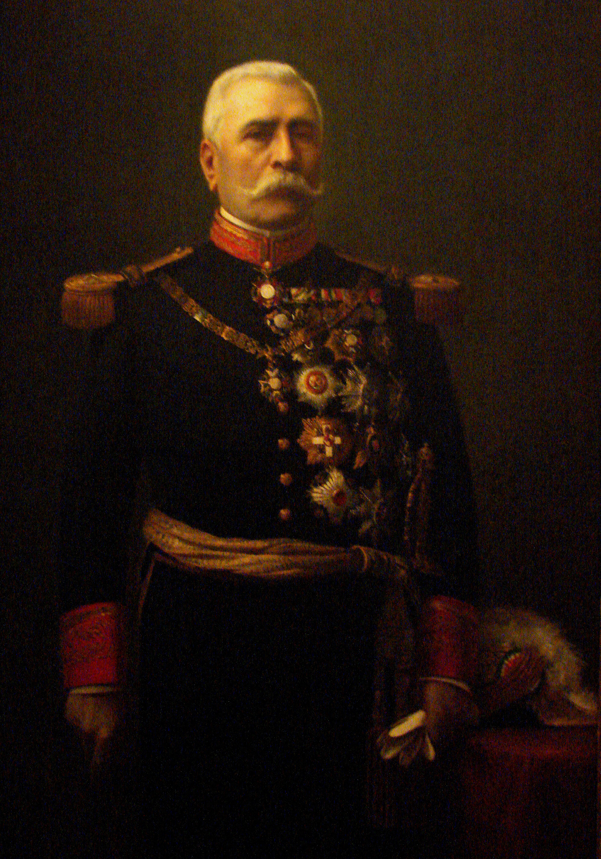 Pintura del entonces Presidente de México Porfirio Díaz Mori (1830-1915), exhibida en el museo del Templo y Ex-Convento de Santo Domingo de Guzmán, en la ciudad de Oaxaca de Juárez, Oaxaca, México.